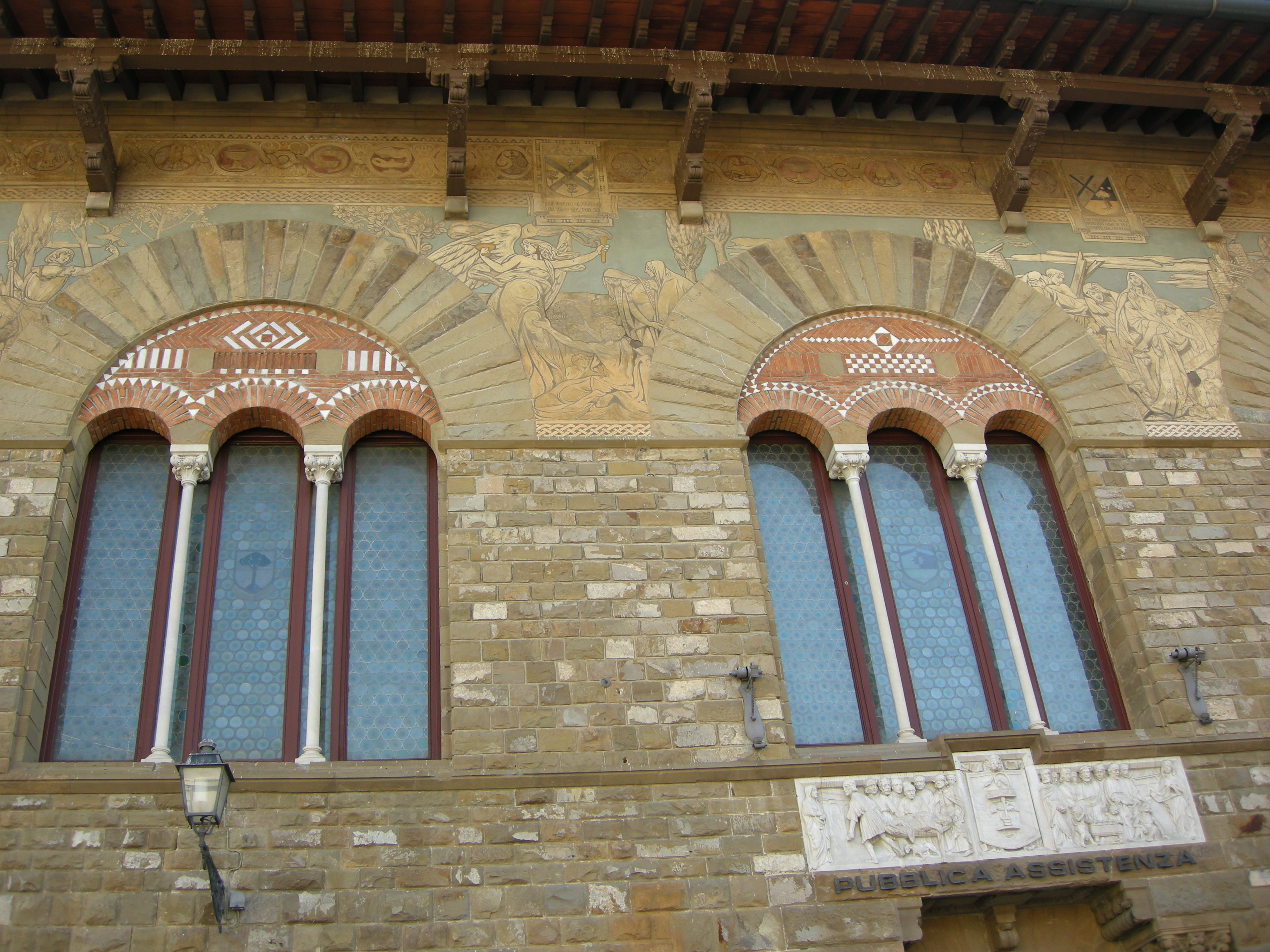 Palazzo della pubblica assitenza, prato